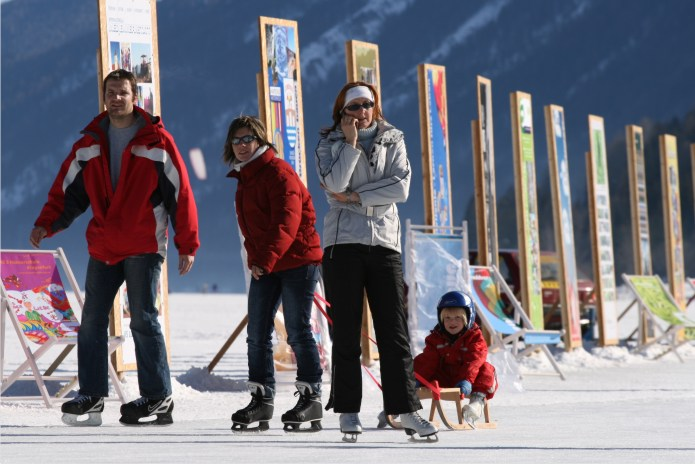 Bilder am Eis / Europas einzigartige Freiluftgalerie am Weissensee